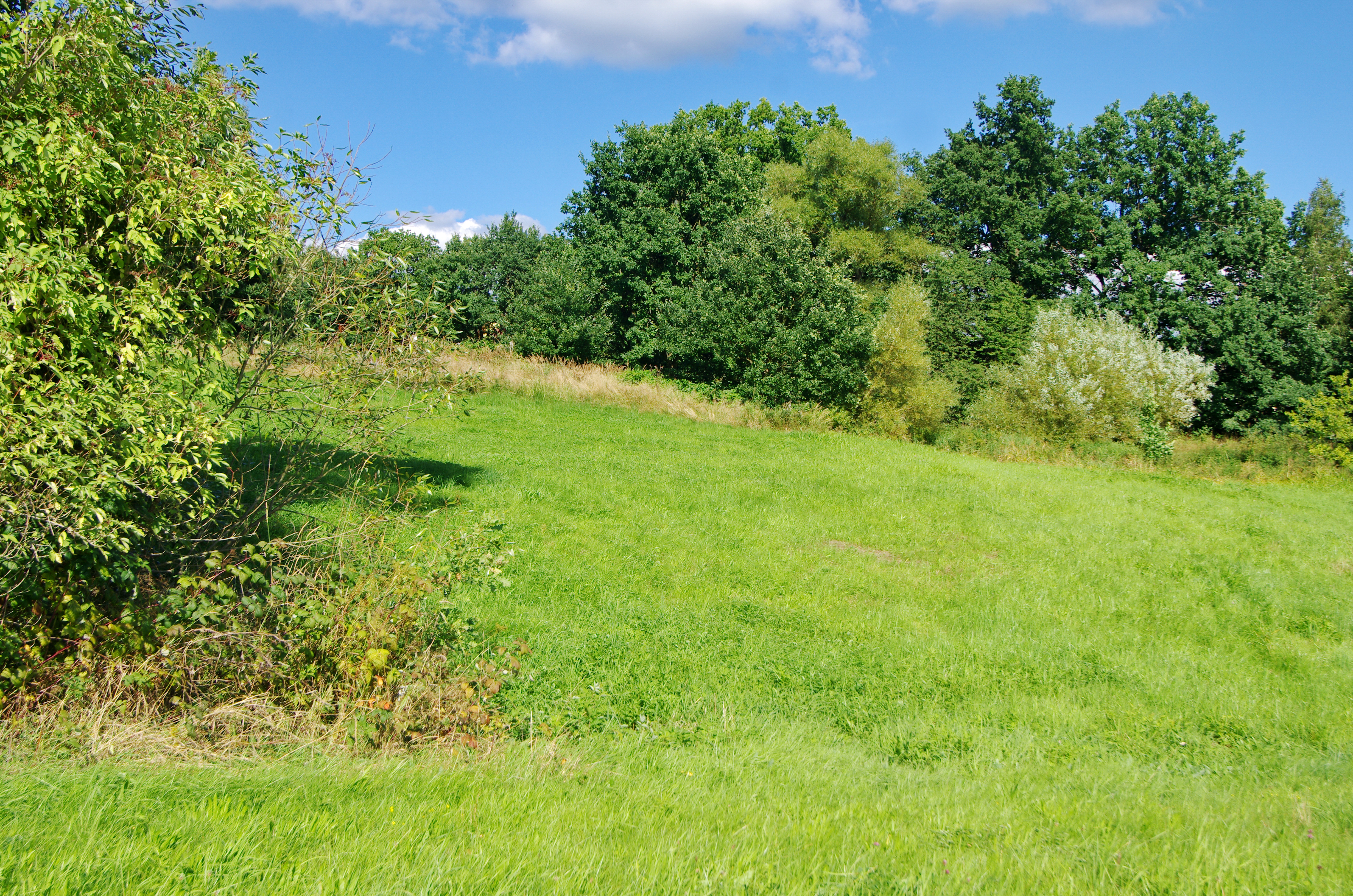 Božetín, místní část obce Nový Kostel, místo zaniklé středověké trvzi, okres Cheb